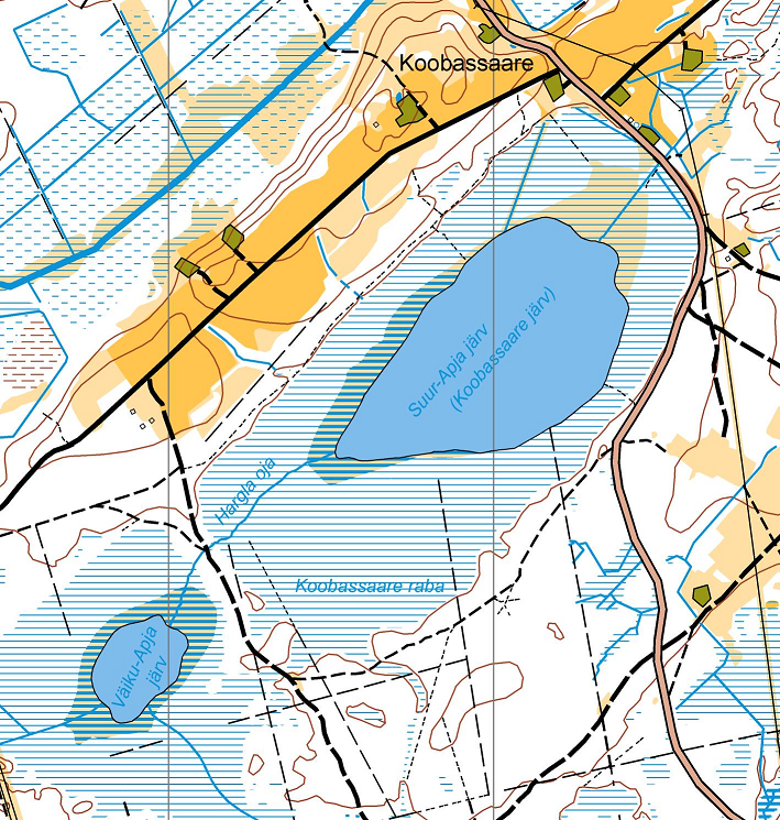 Apja järved